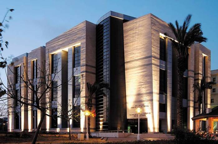 תמונה של המרכז לחקר המח ע"ש גונדה, באוניברסיטת בר אילן.